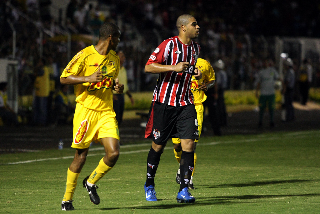 Adriano do São Paulo muito bem marcado durante o jogo.